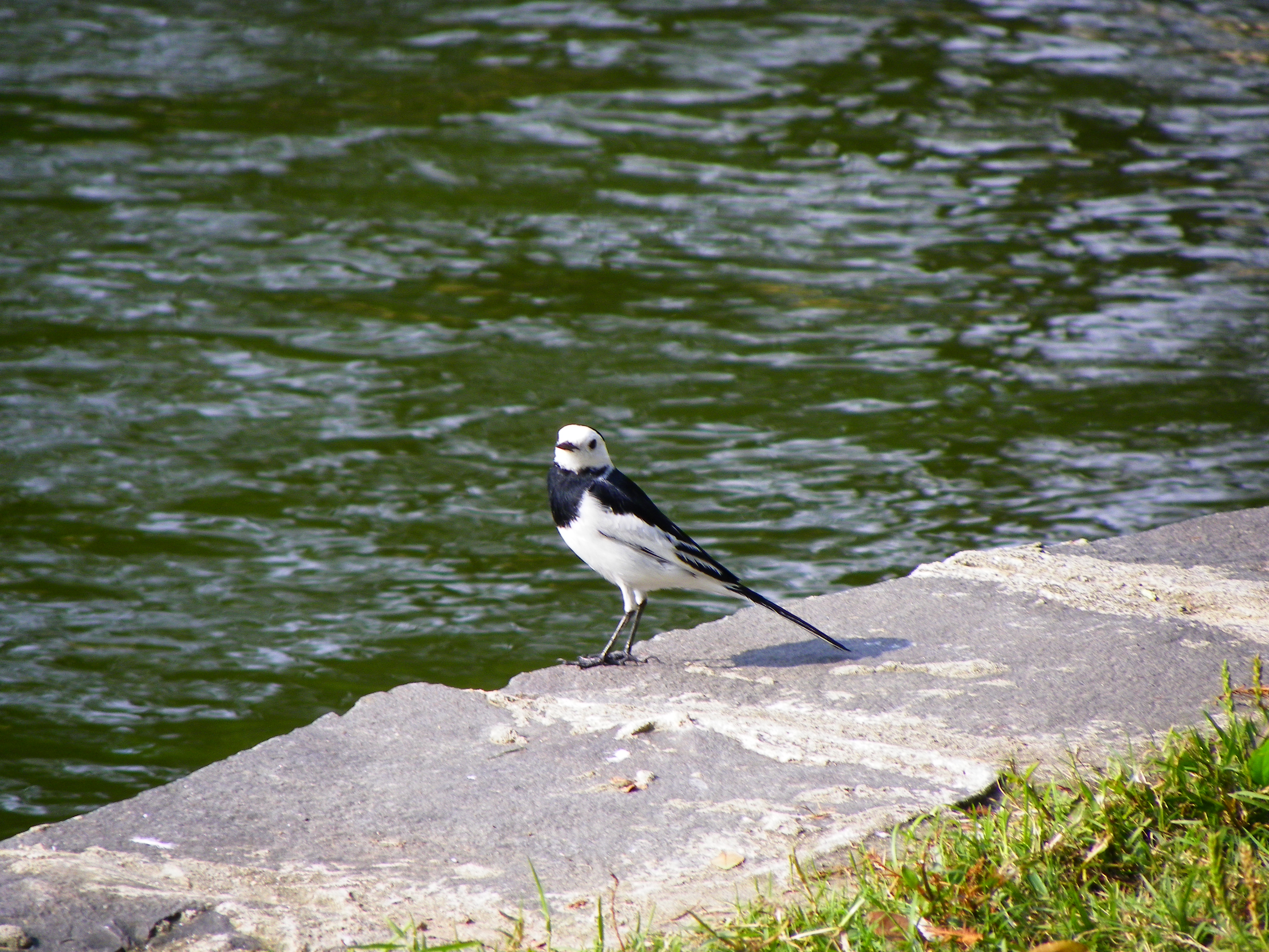 台北市内湖区大湖公園に、湖ほとりのホオジロハクセキレイ。中文（台灣）: 臺北市內湖區大湖公園湖畔的白鶺鴒（Motacilla alba leucopsis）。